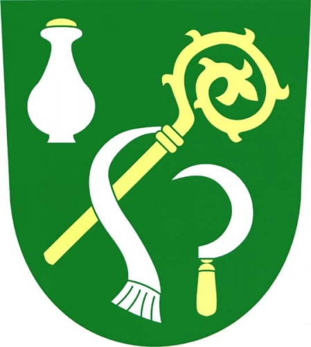 znak,Kouty , okres Třebíč